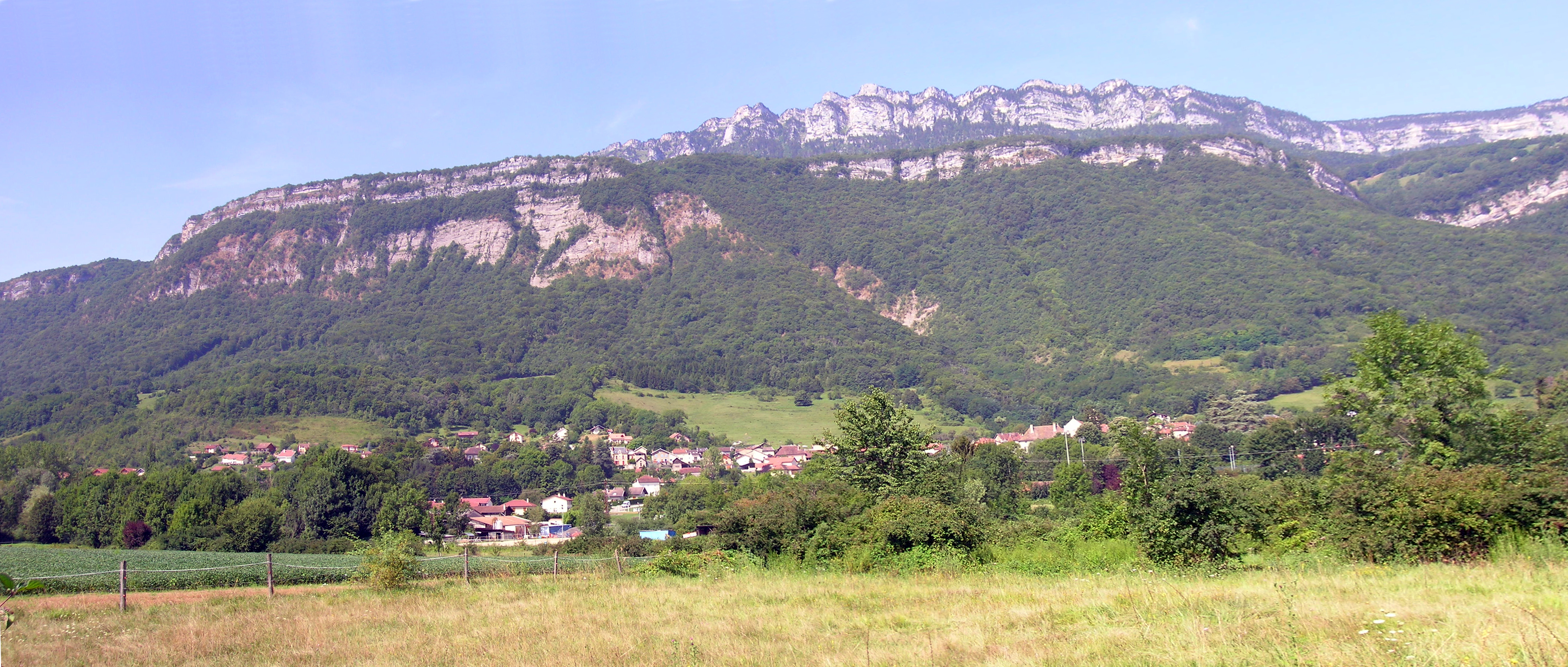 Barraux vu depuis le chemin entre Le Fort sud et La Pointe. Barraux, Isère, AuRA, France.